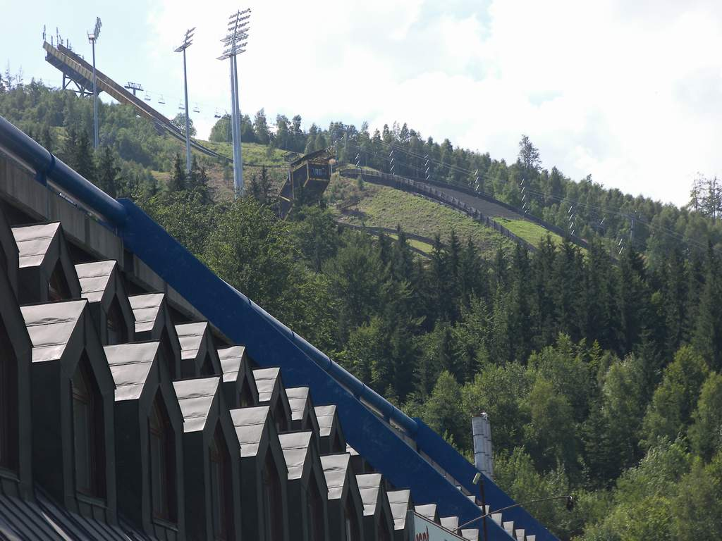 skocznia